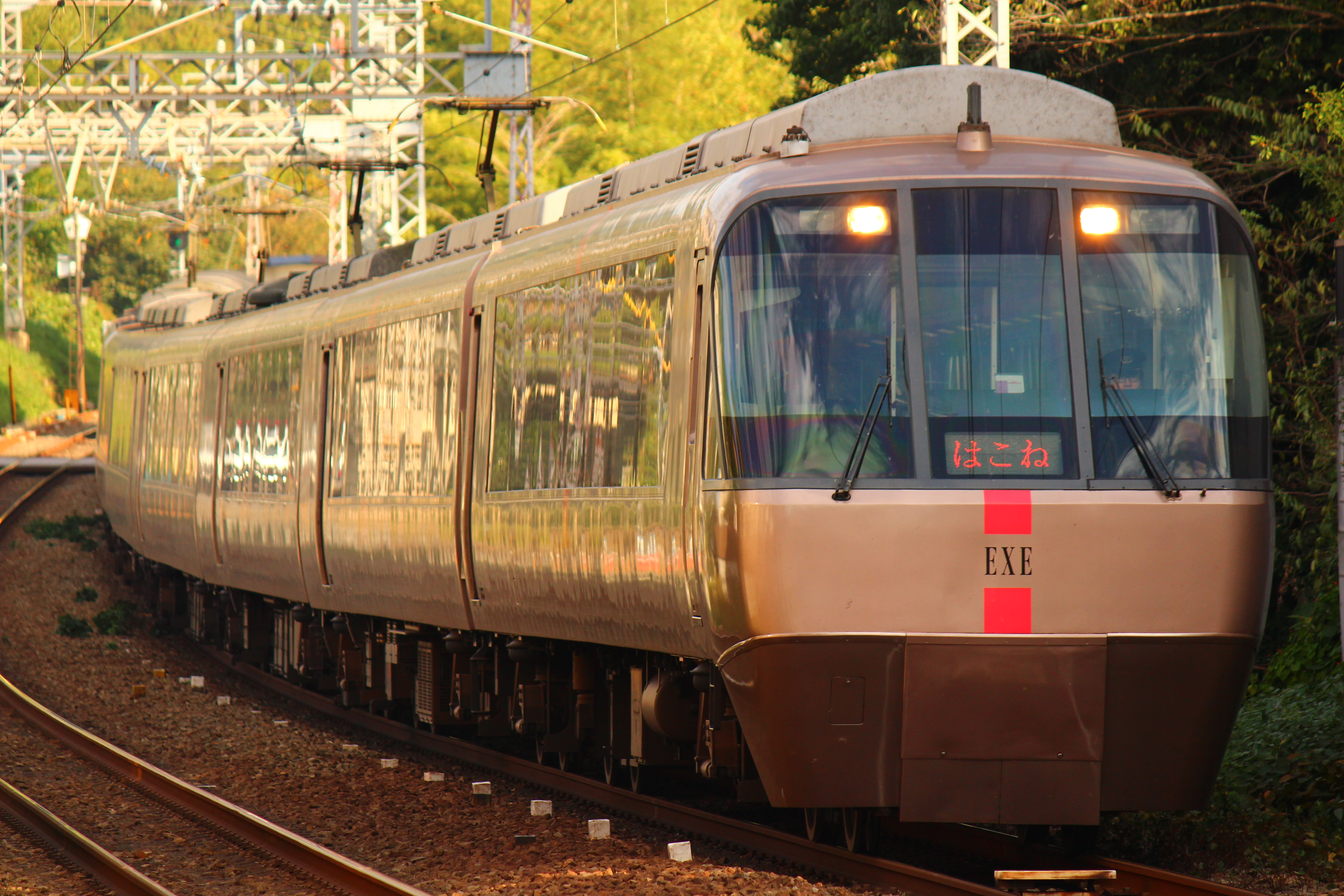 小田急電鉄 特急形ロマンスカー 30000形EXE